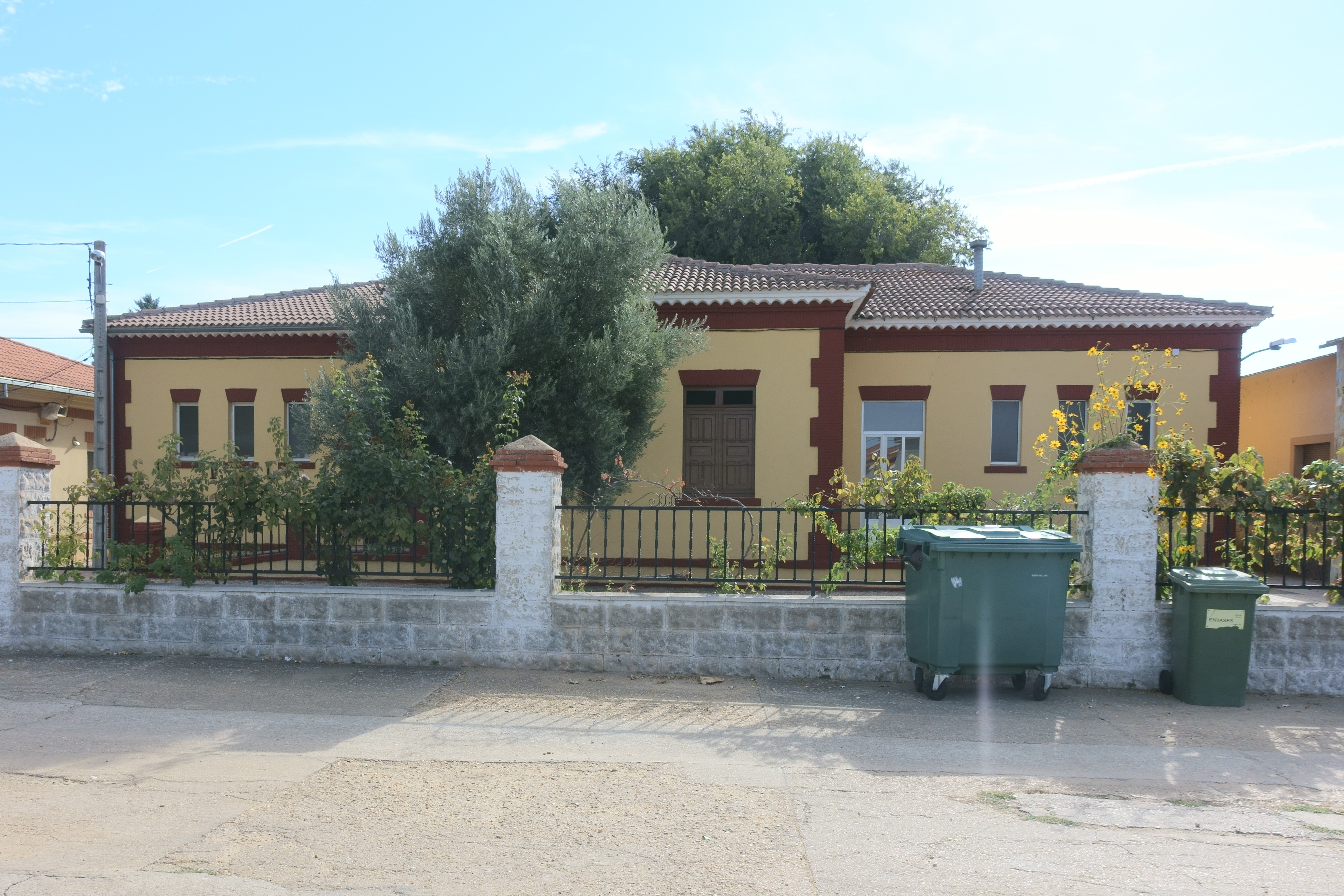 Casa consistorial de Cañizo (Zamora, España).